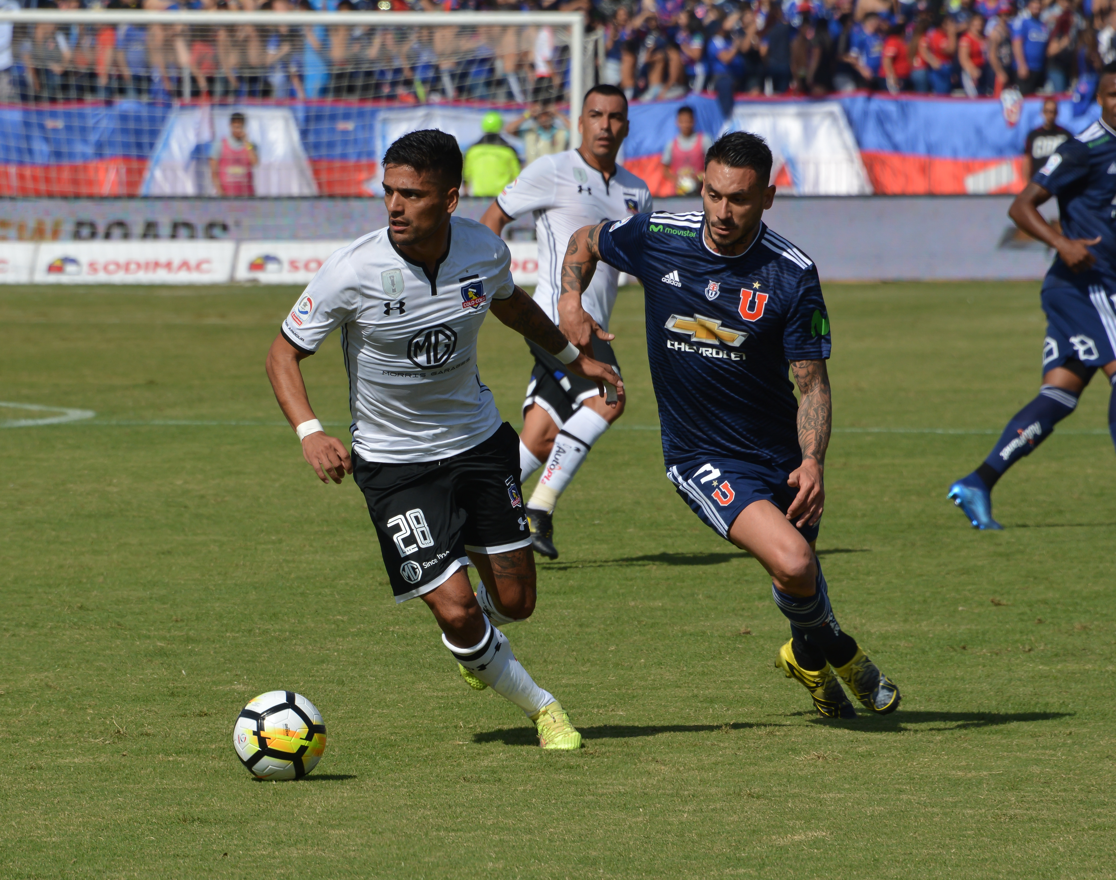 Universidad de Chile v Colo-Colo, Estadio Nacional, Santiago, Chile.